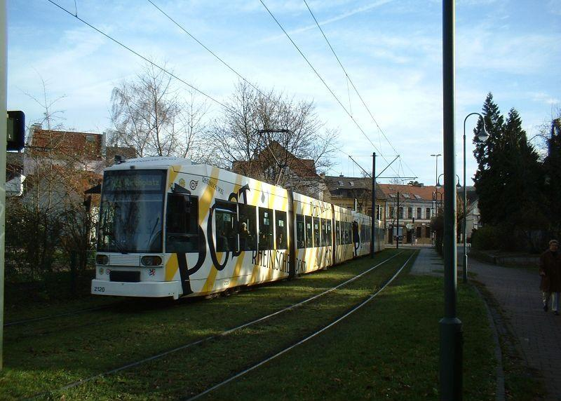 Düsseldorf: NF6-Doppeltraktion auf der Linie 703 zwischen "Schönaustraße" und "Gerresheim, Rathaus"